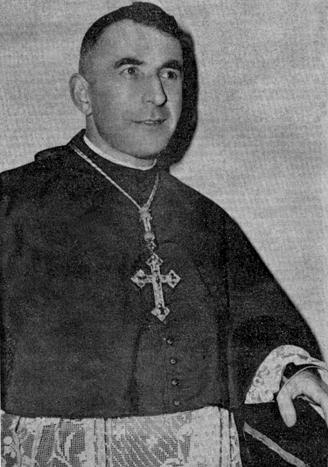 Albino Luciani da vescovo di Vittorio Veneto